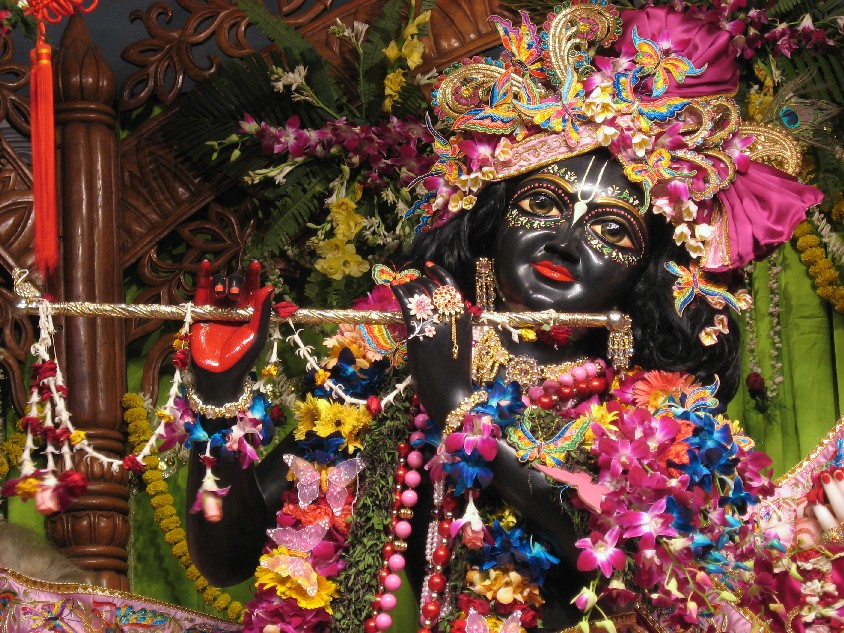 Krishna ISKCON Mayapur Gaura Purnima 2008